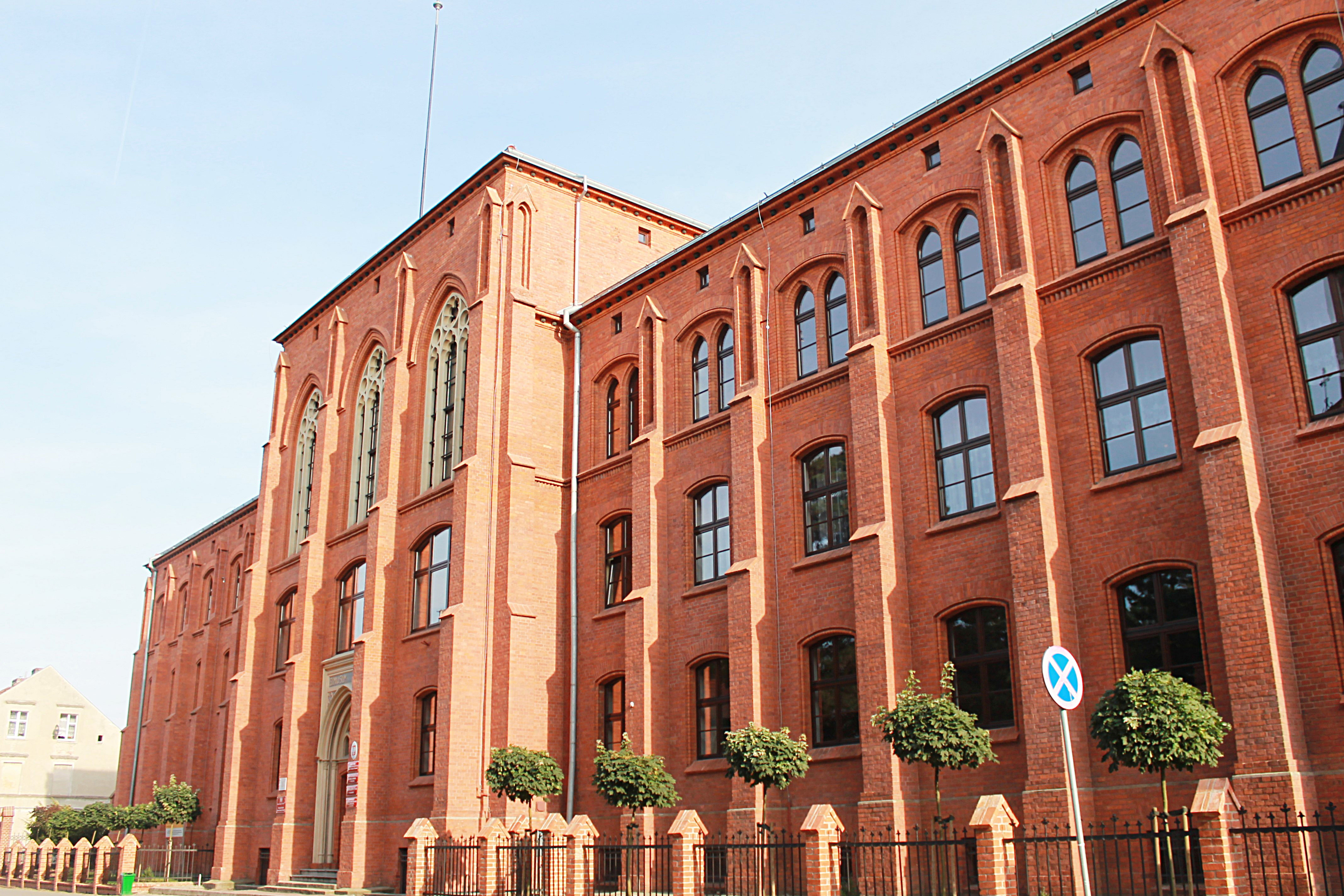 Chełmno, szkoła, 1862-1866